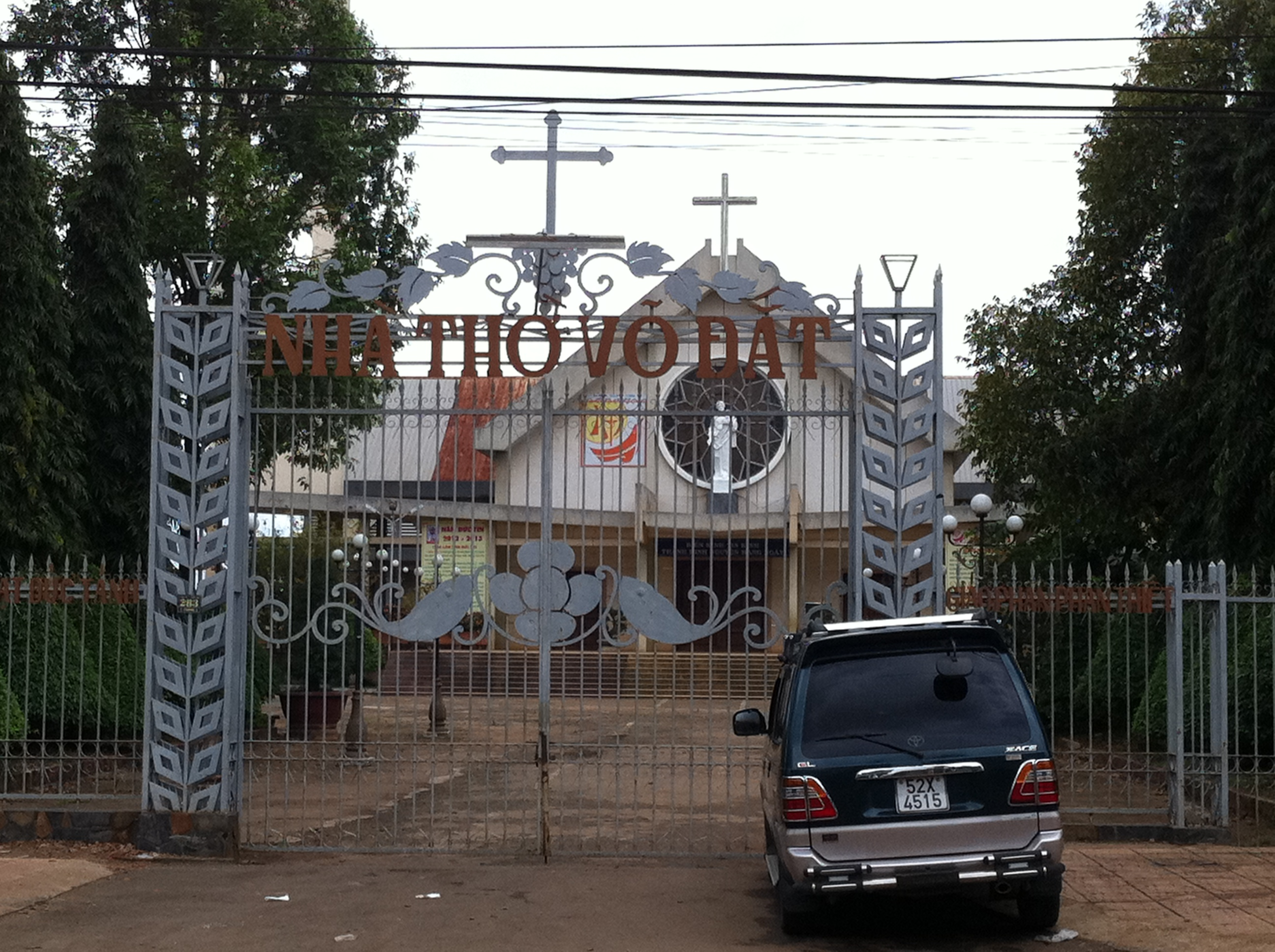 Nhà thờ Đức Tài